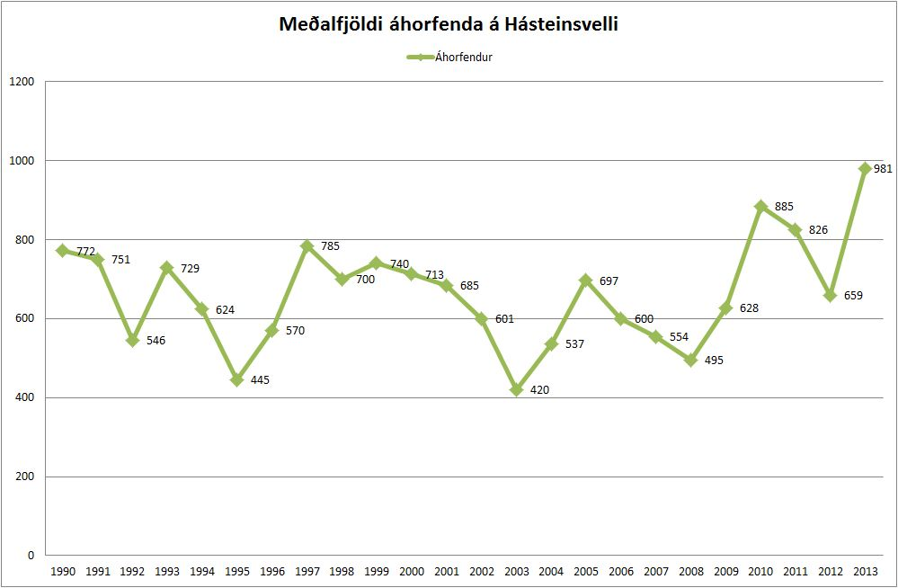 Meðalfjöldi áhorfenda á Hásteinsvelli milli tímabila.